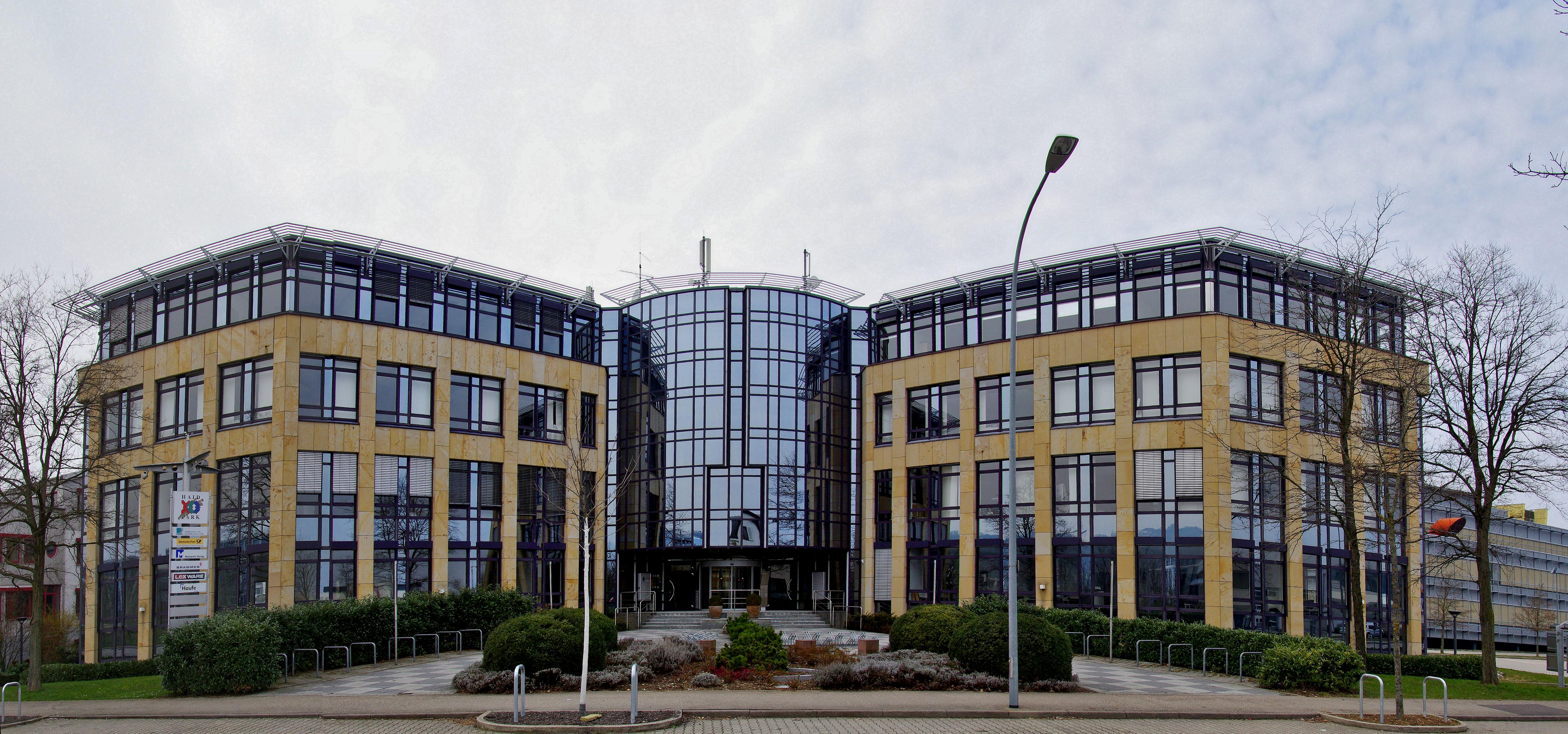 Der Haid-Park mit mehreren Firmen